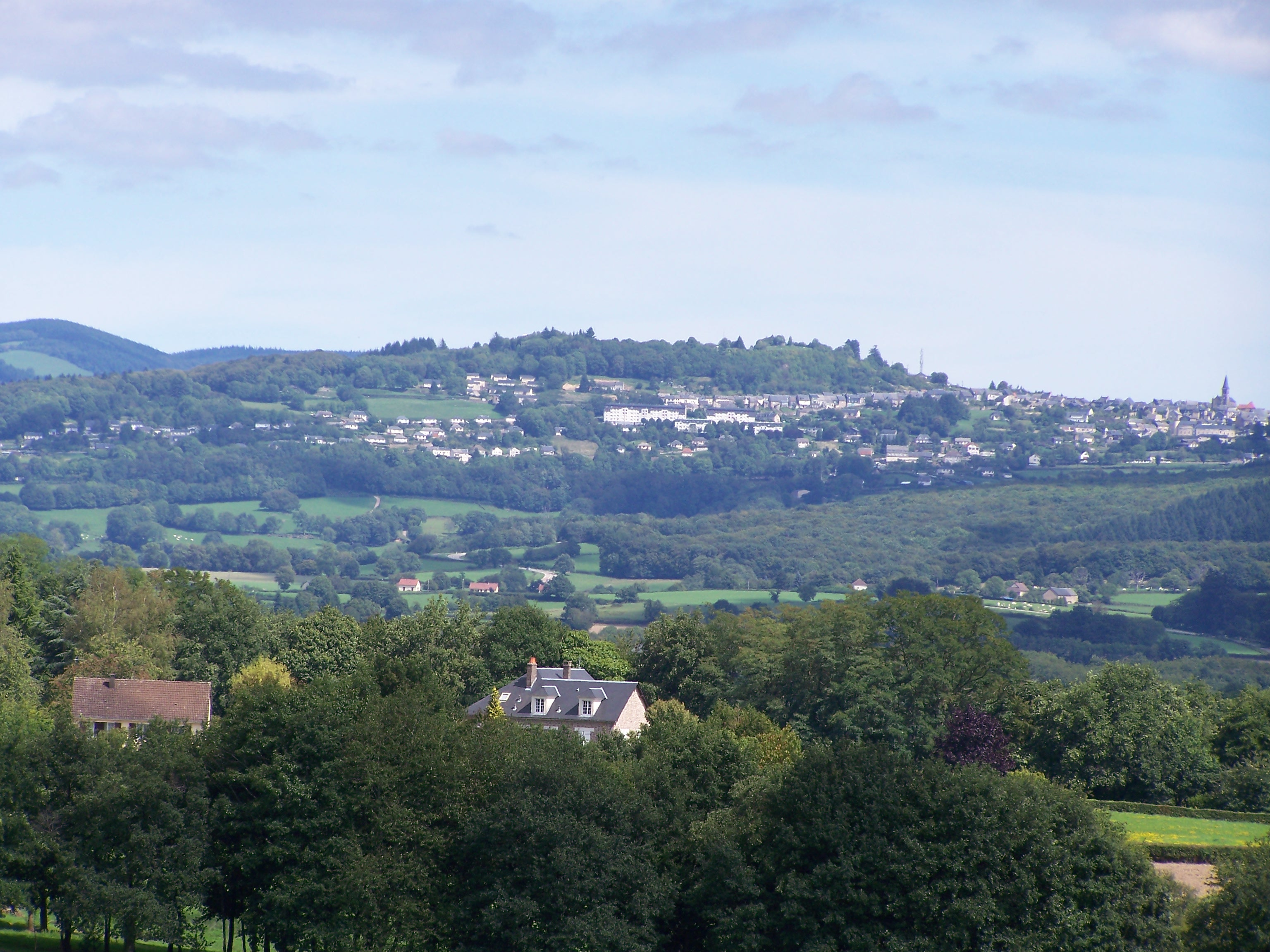 Château-Chinon (Ville) : vue depuis le village de Dommartin